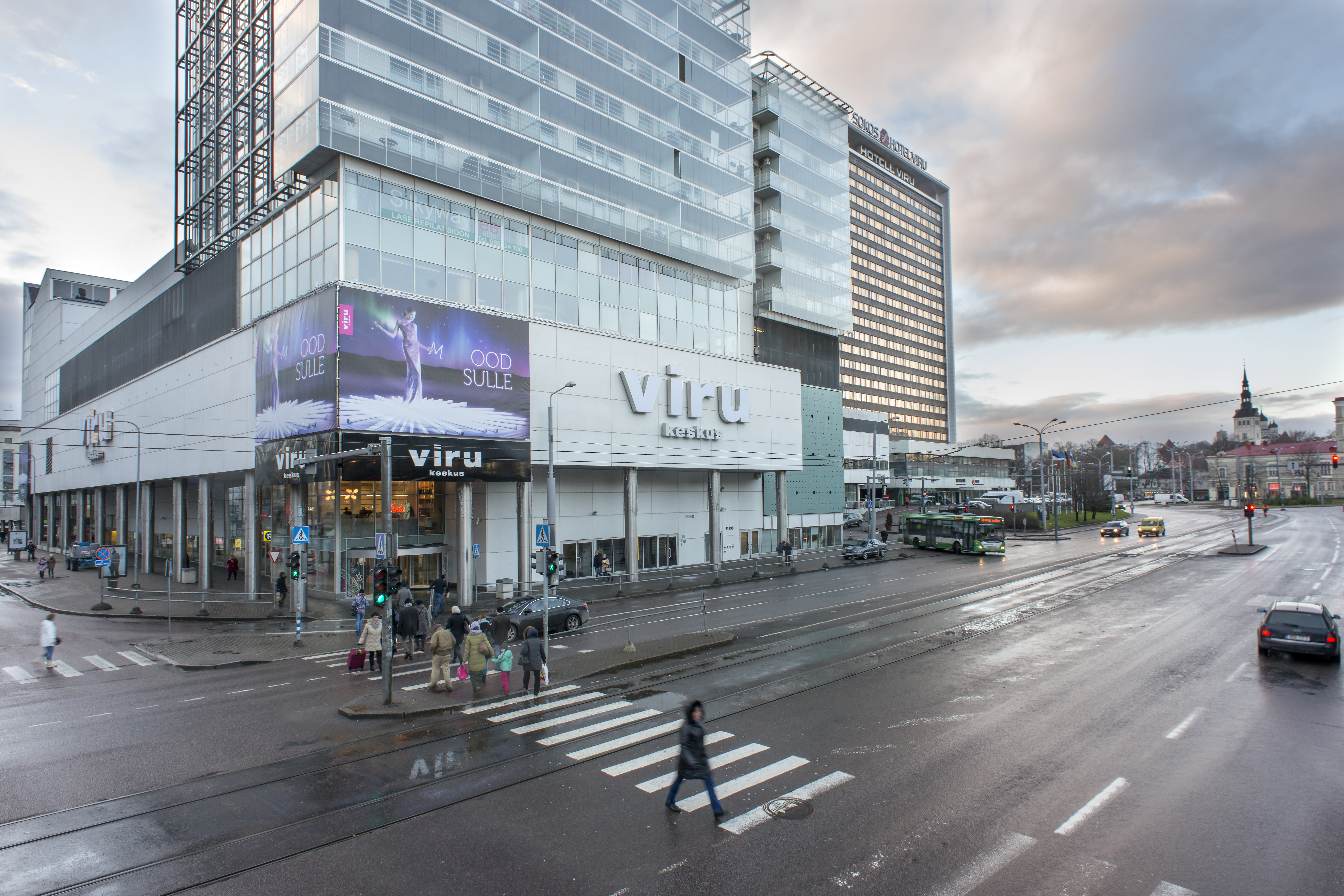 Viru Keskus Narva mnt ning Laikmaa tn nurgalt vaadatuna. Detsember 2014. Foto: Jaanus Ree.